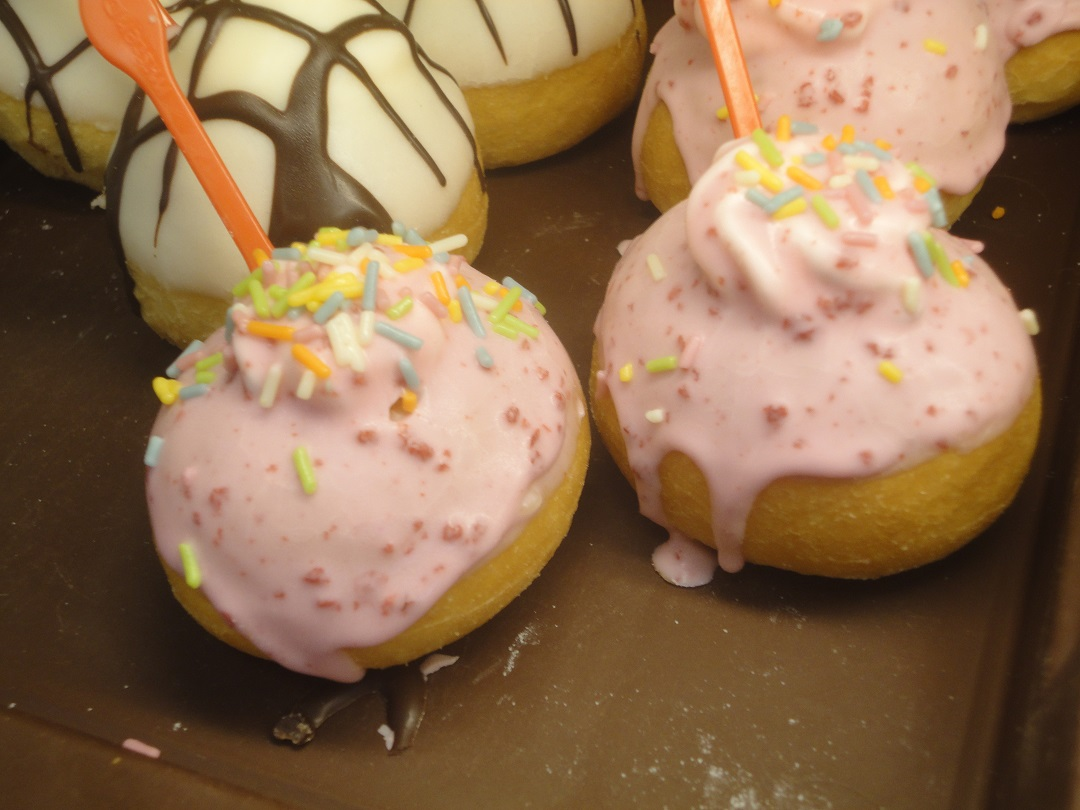 スプレーチョコをちりばめたスイーツ。